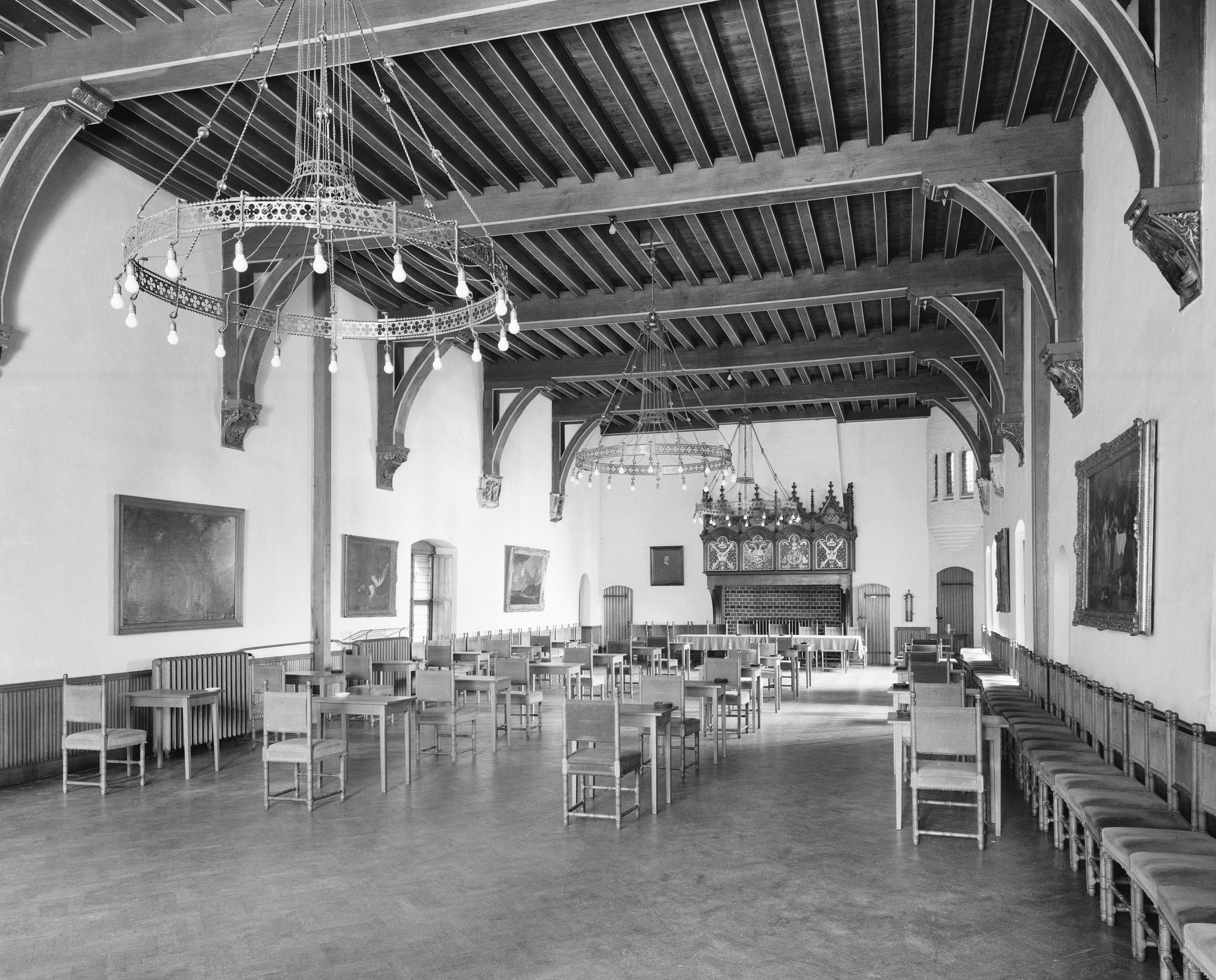 Voormalig paleis van de graven van Holland met Ridderzaal: Interieur van de Rolzaal